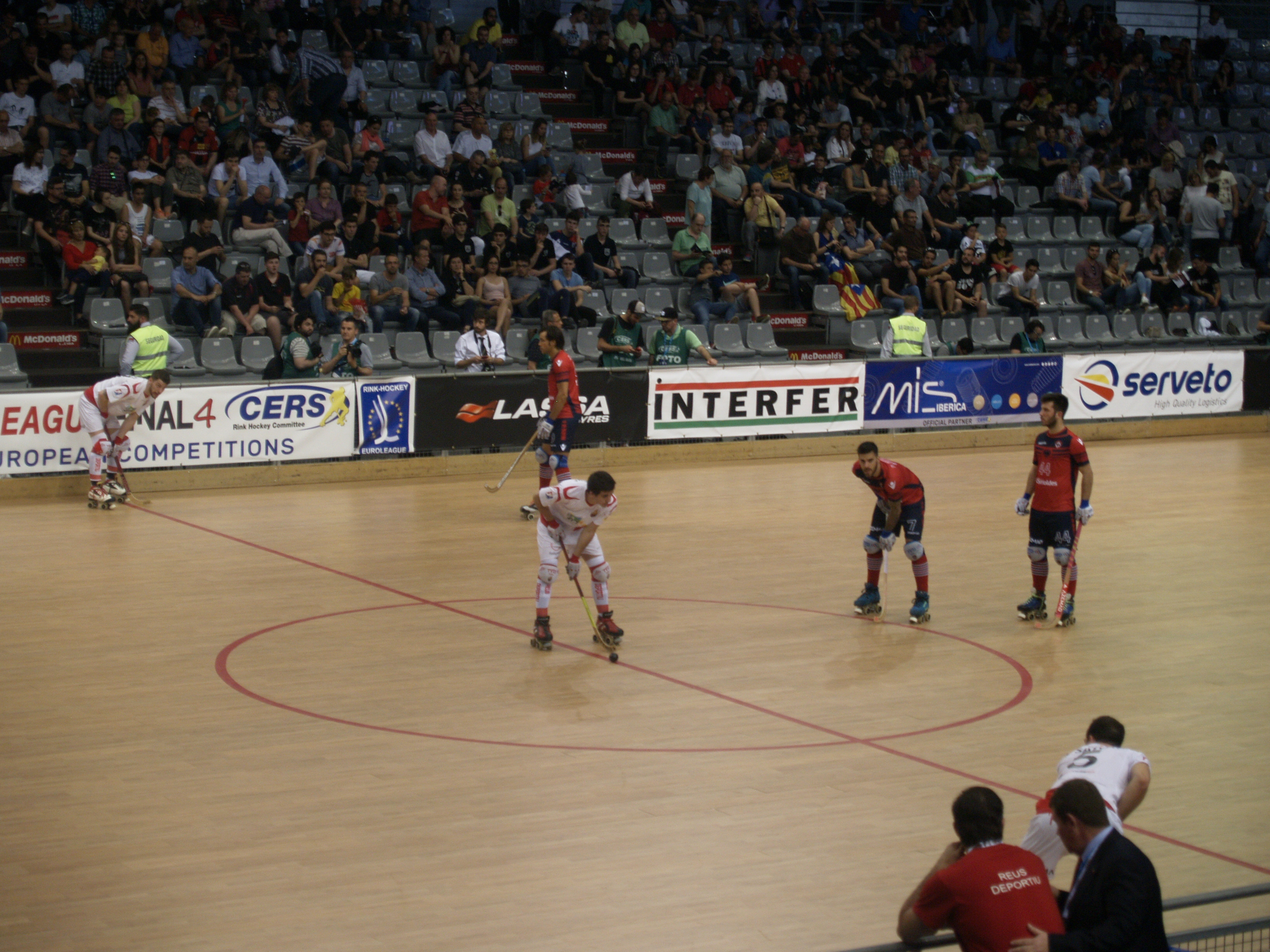 Final de la CERH European League 2016-17 celebrada en Lleida entre el Oliveirense y el Reus.